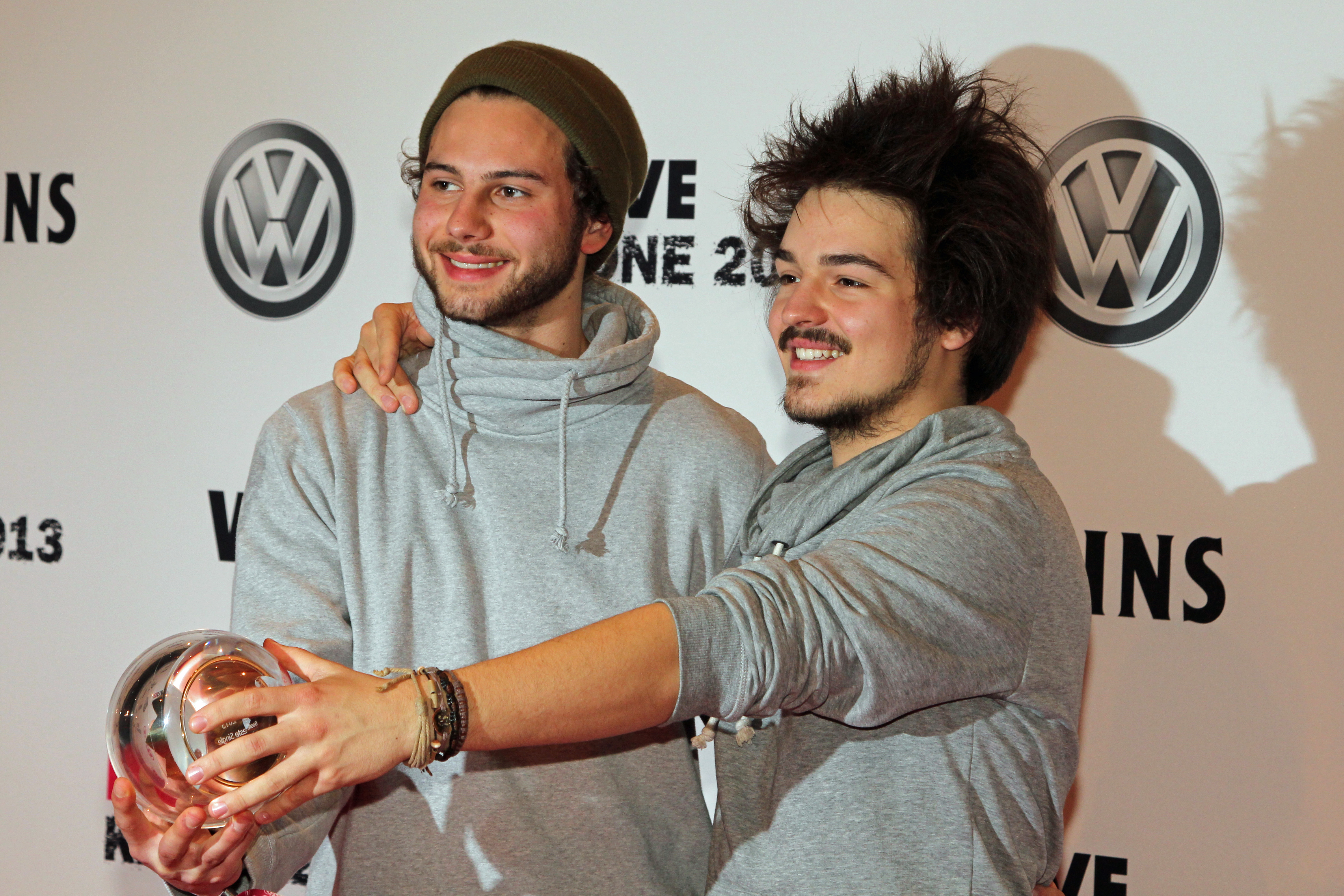 1 LIVE Krone 2013 Preisträger Milky Chance